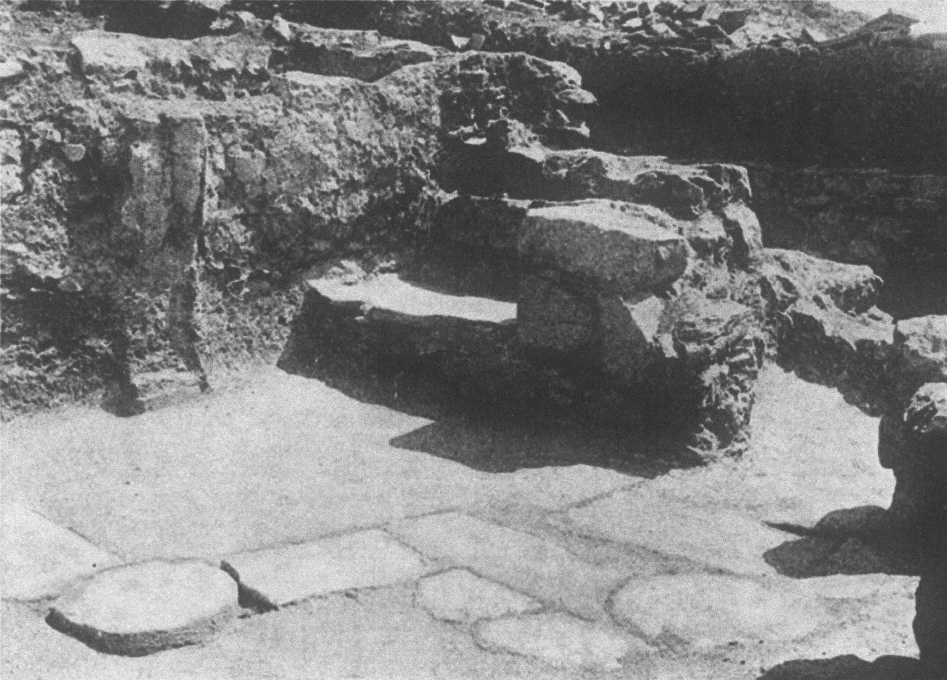 Ausgrabungen in Mochlos im Jahr 1908 durch Richard B. Seager, Kreta, Griechenland